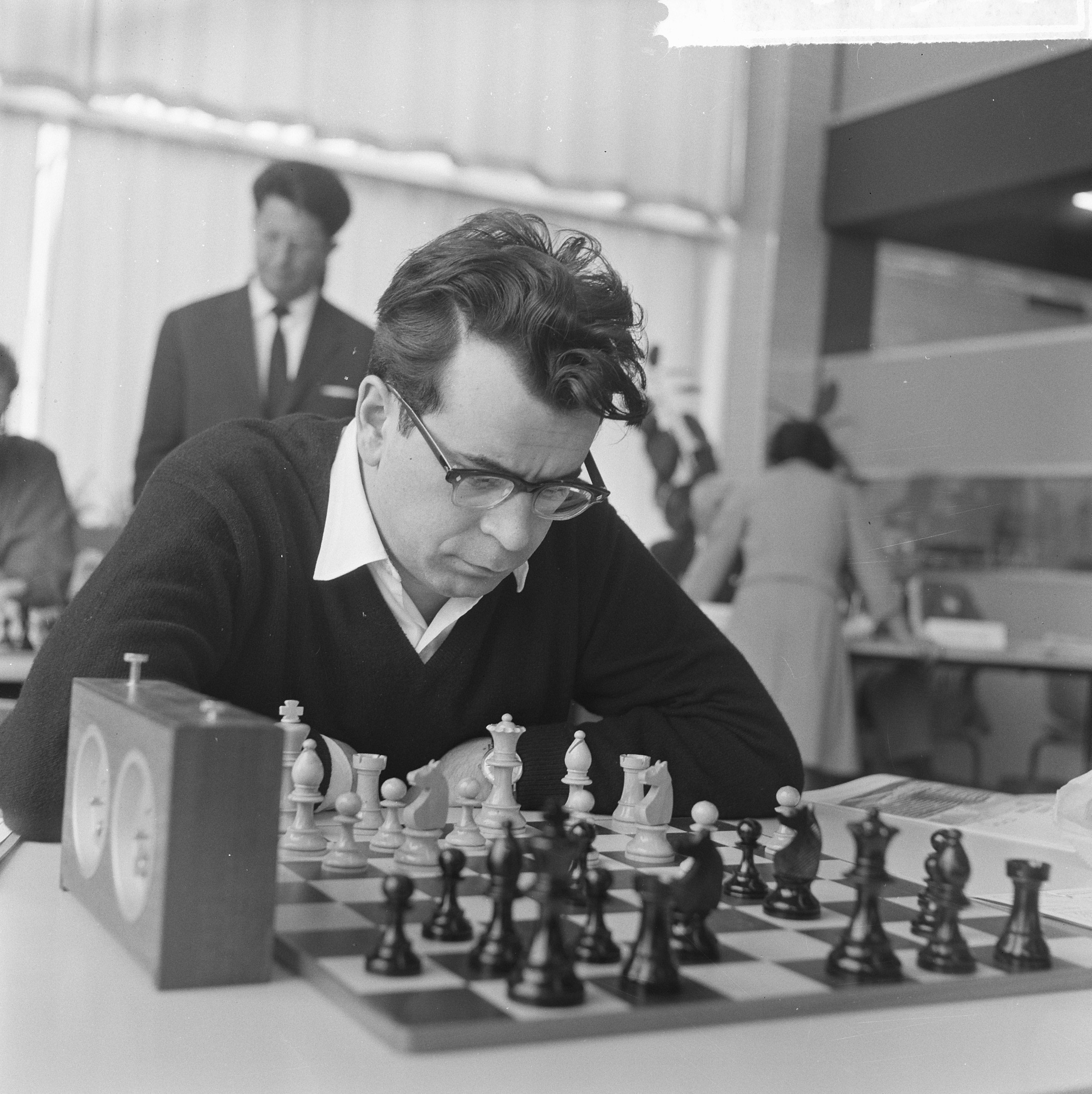 Collectie / Archief : Fotocollectie Anefo Reportage / Serie : [ onbekend ] Beschrijving : Interfide schaaktoernooi in GAK gebouw, Pal Benko (VS) Datum : 21 mei 1964 Locatie : Amsterdam, Noord-Holland Trefwoorden : portretten, schaken, sport Persoonsnaam : Benko Pal Instellingsnaam : GAK Fotograaf : Broers, F.N. / Anefo Auteursrechthebbende : Nationaal Archief Materiaalsoort : Negatief (zwart/wit) Nummer archiefinventaris : bekijk toegang 2.24.01.03 Bestanddeelnummer : 916-4586